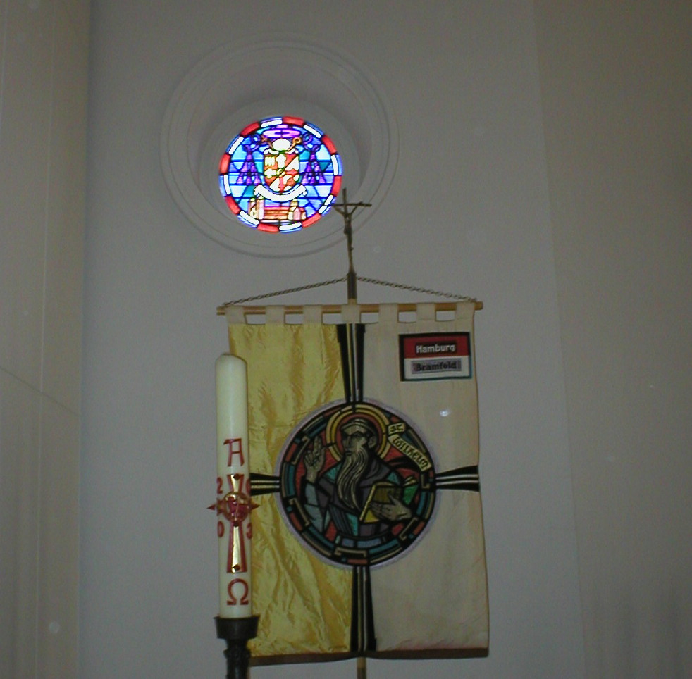 Fenster der Linken Seite des Altarraums und St Wilhelm Fahne